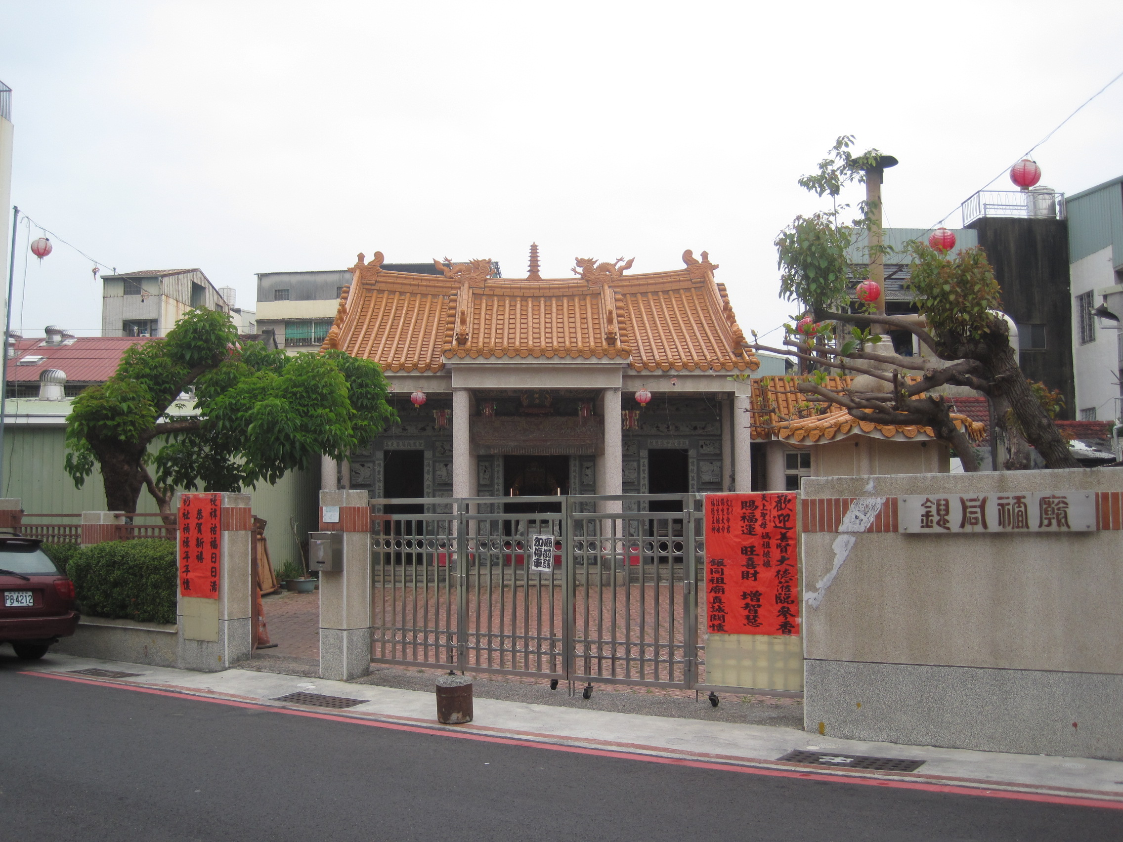 臺南銀同祖廟